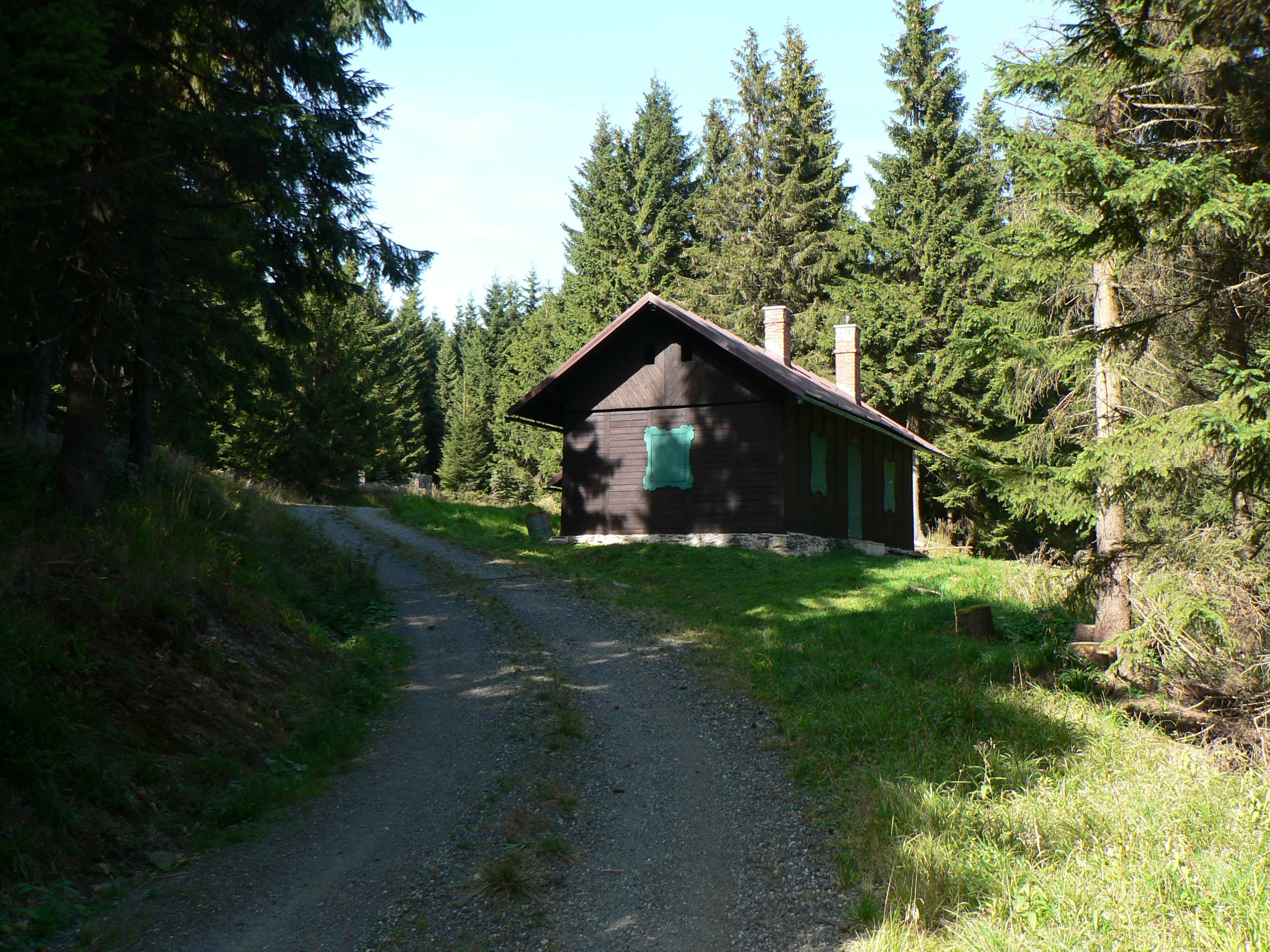 Velkoklínská chata u sedla k Velkému Klínu, Hrubý Jeseník